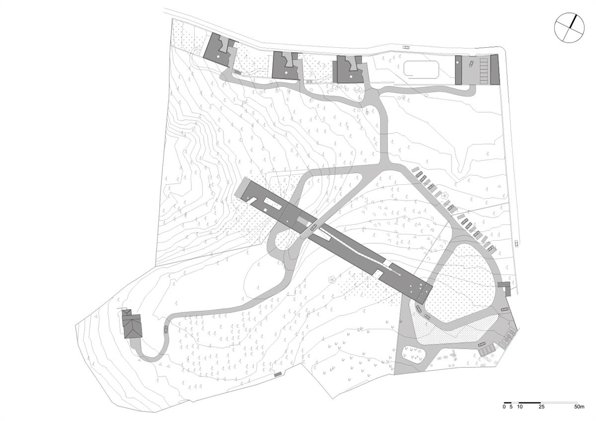 Planta de situação da Embaixada da Holanda na Etiópia, em Addis Abeba